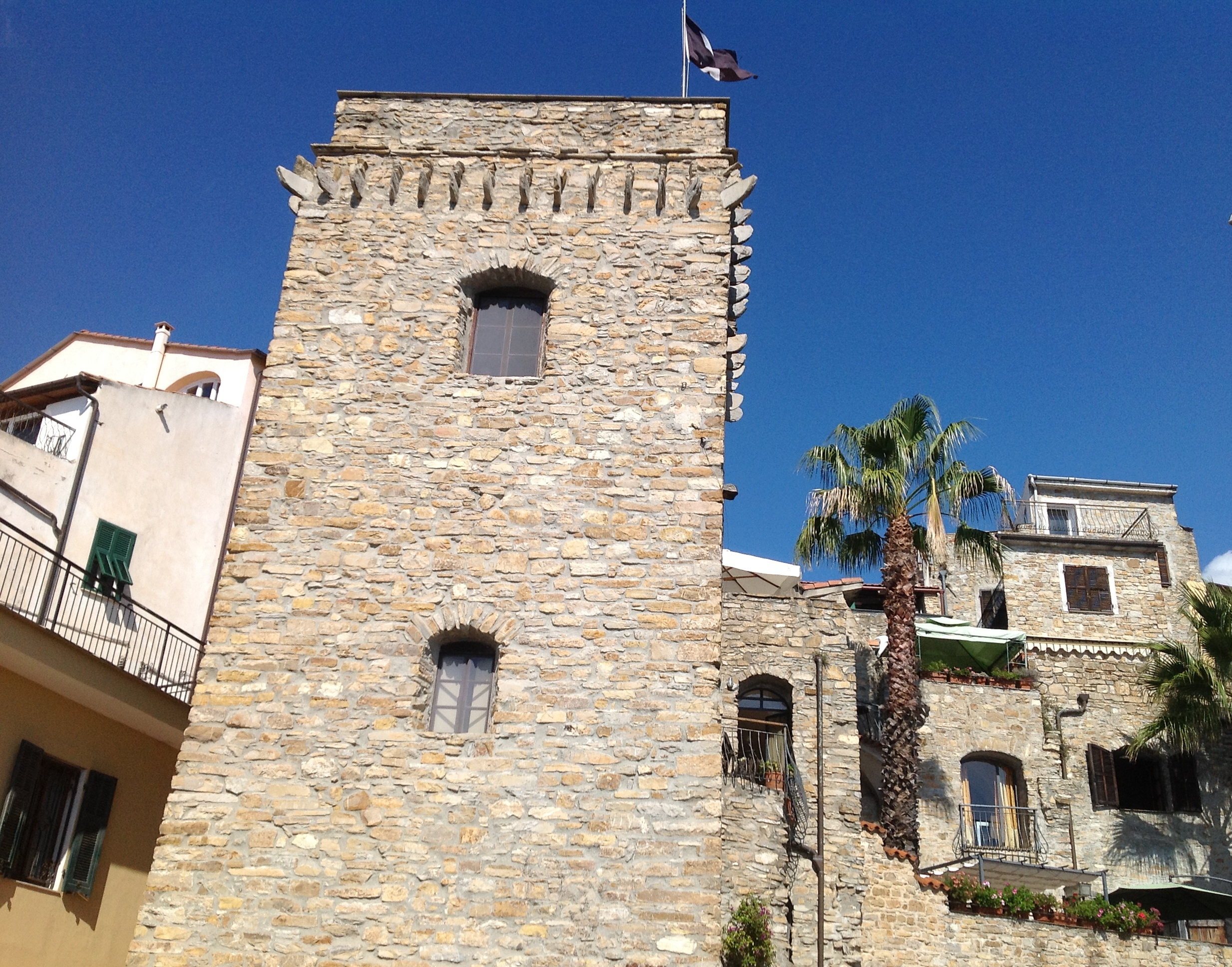 Cipressa